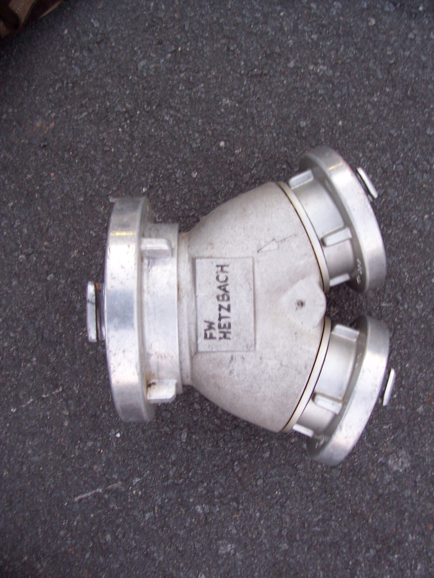 Sammelstück (Wasserführende Armatur)